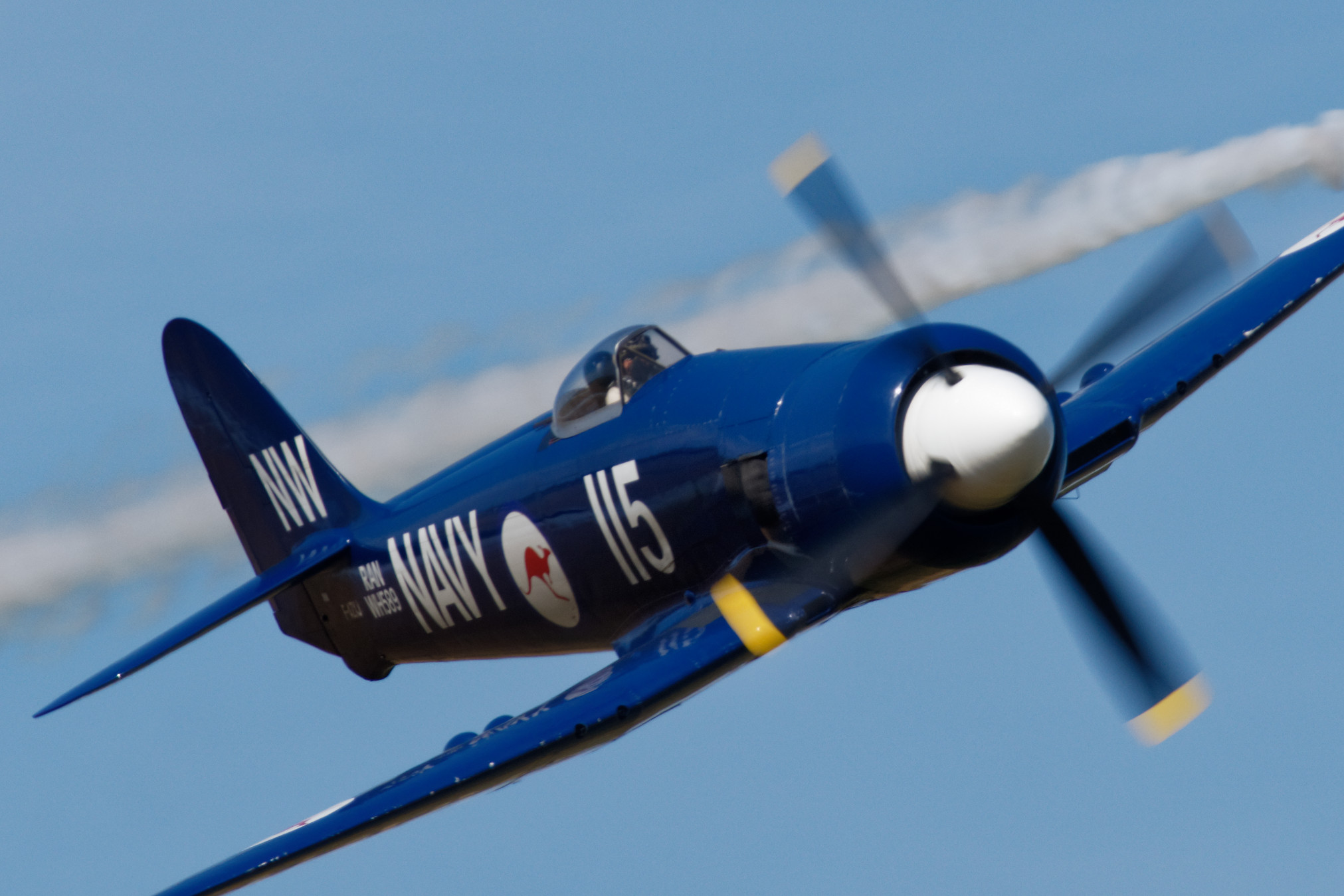 Sea Fury au meeting de Melun 2018